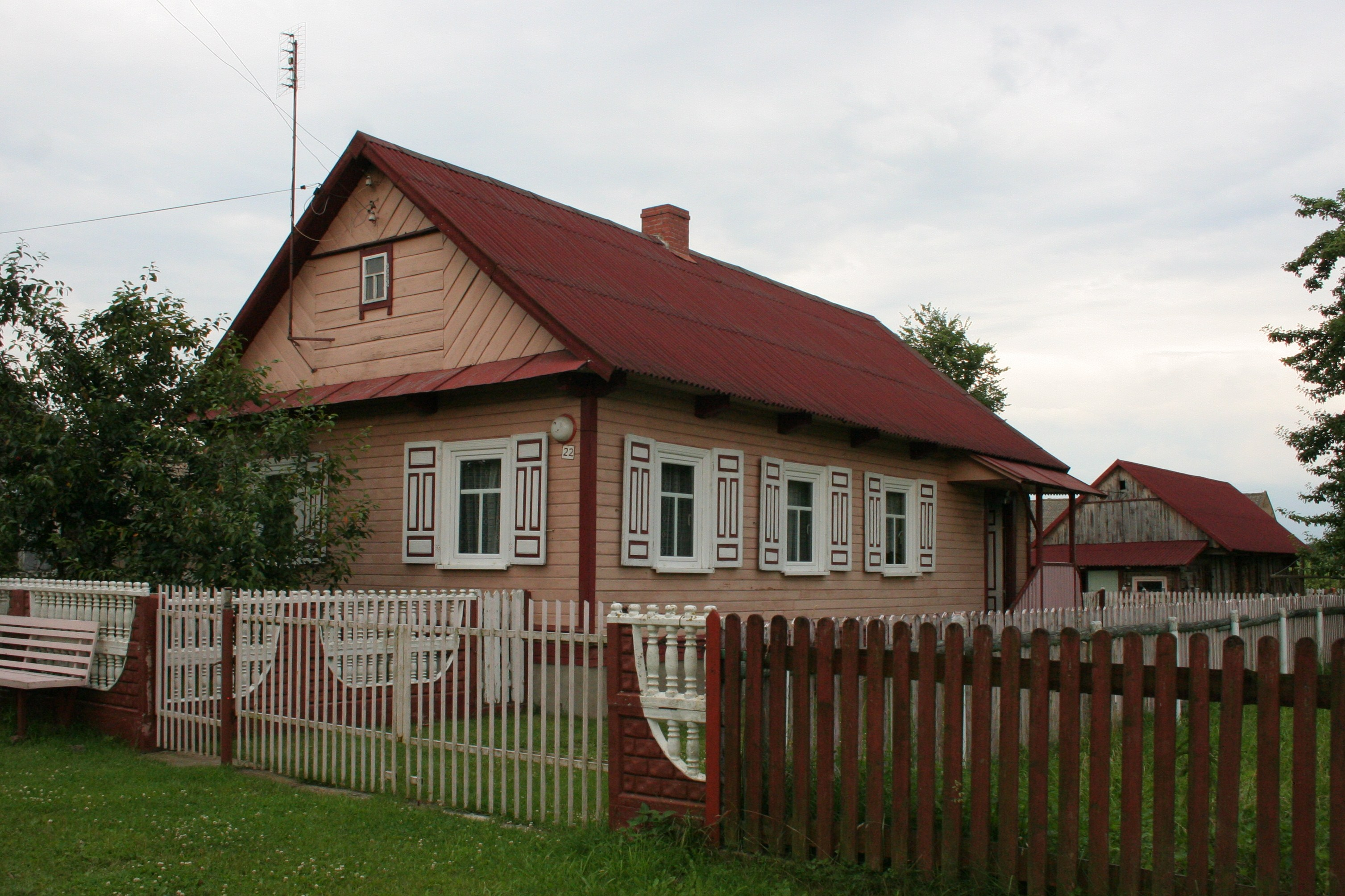 Dom mieszkalny w Tyniewiczach Małych.